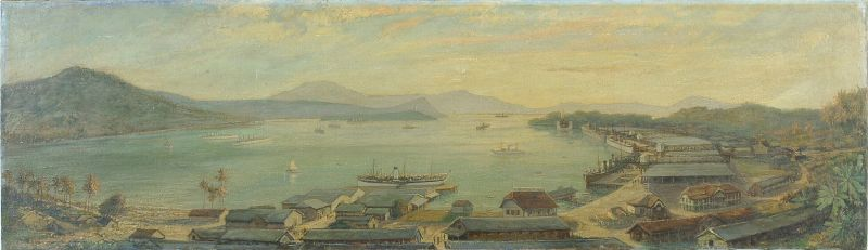 Olieverfschilderij. De haven van Sabang op Sumatra